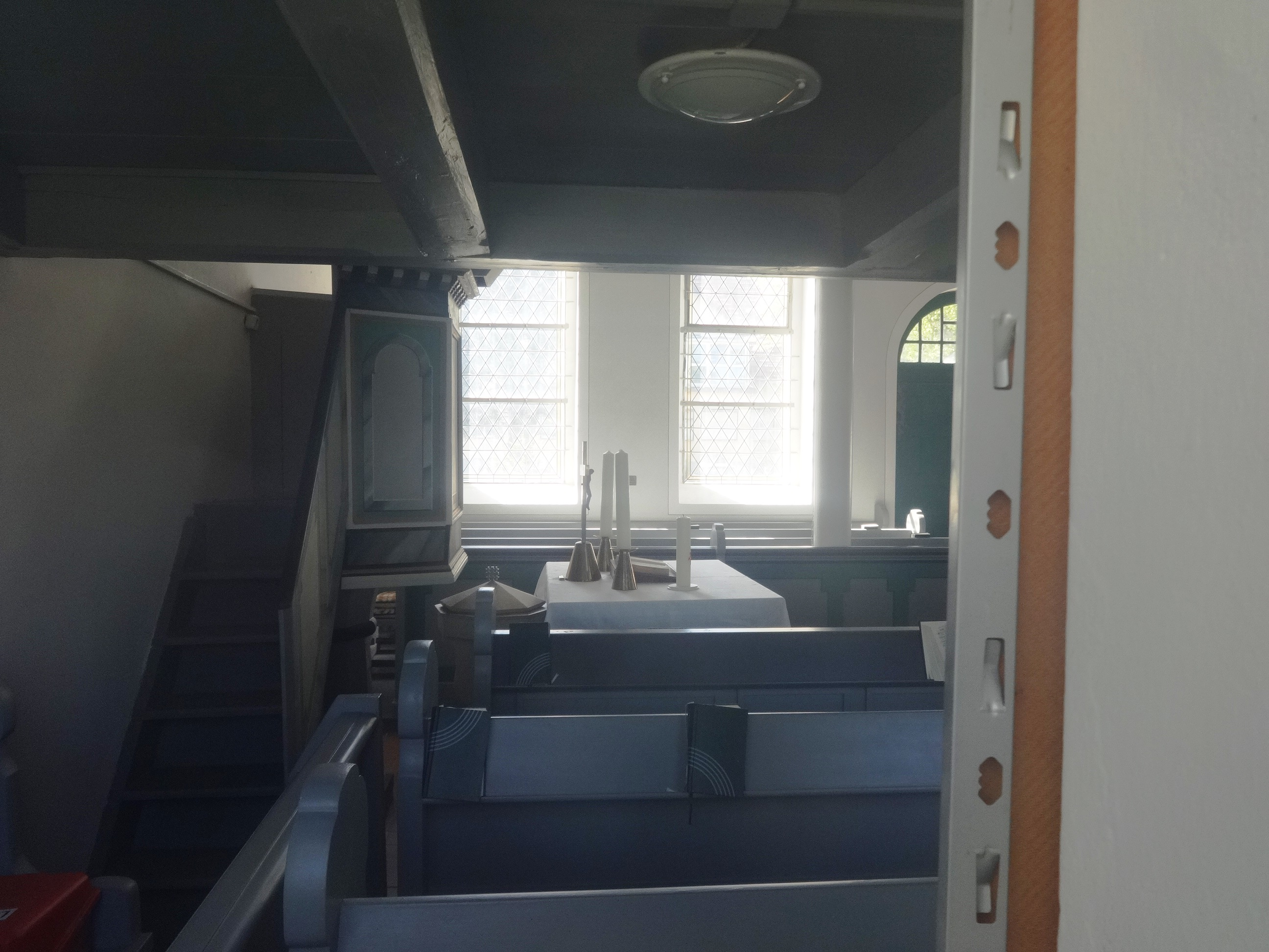 Die evangelische Dorfkirche Salzbrunn ist eine Saalkirche, die in den Jahren 1784/1785 von den Pfälzer Siedlern errichtet wurde. In den Jahren 2003 und 2004 erfolgte eine umfangreiche Sanierung. Im Innern befindet sich eine schlichte Ausstattung aus der Bauzeit.